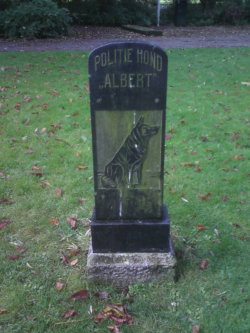 Werk: Grafsteen voor politiehond Albert; Kunstenaar: Onbekend; Jaar: 1924; Straat: Oosterpark; Materiaal: Natuursteen. Overigens is dit niet de originele voet.